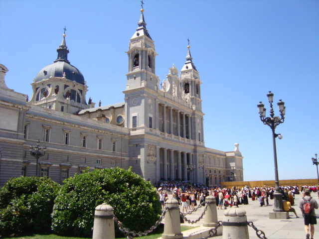 Vista de la Almudena de Madrid, desde el Palacio Real